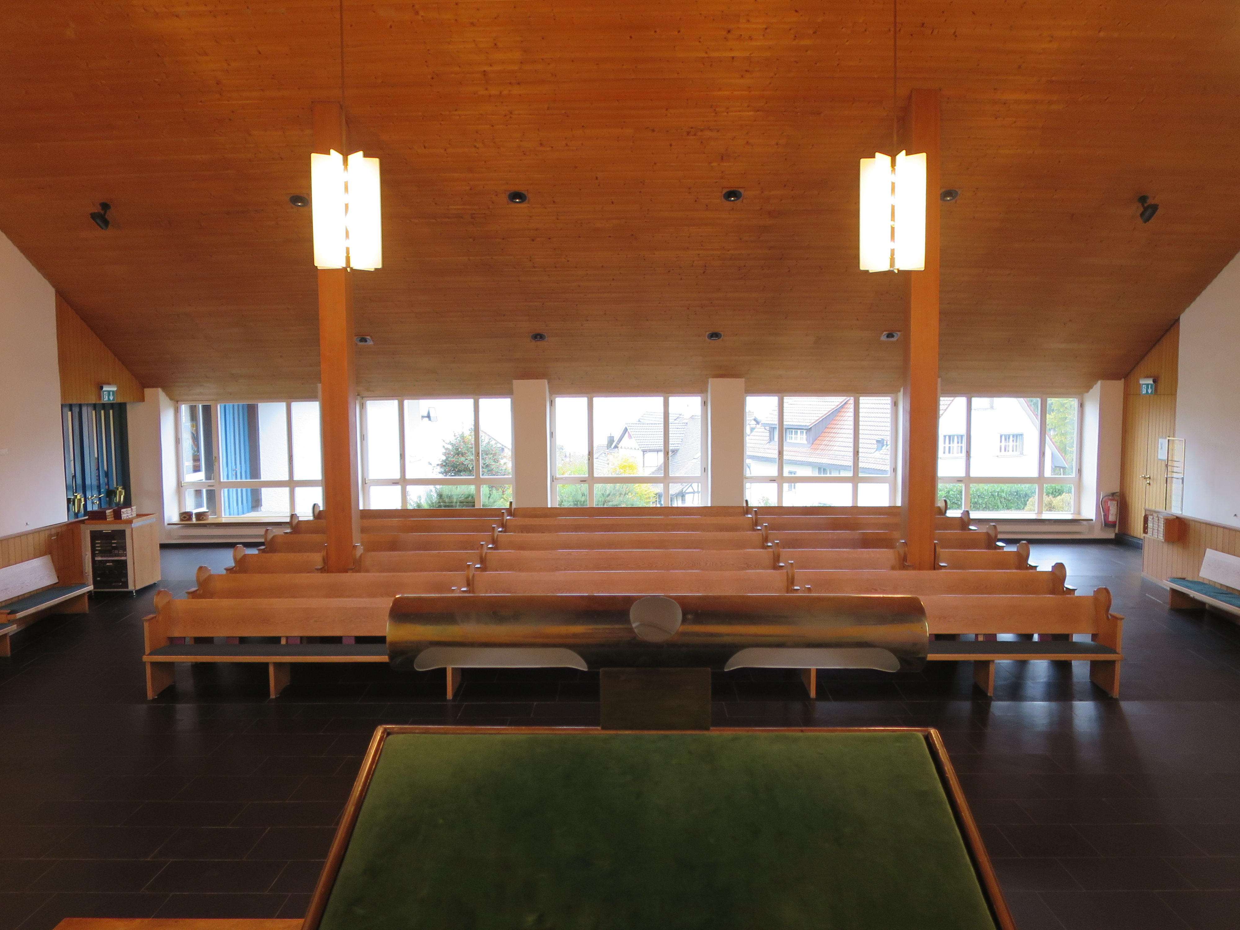 Ref. Kirche Rüschlikon - Blick nach Osten